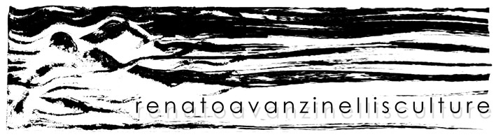 studio locandina per la mostra di renato avanzinelli